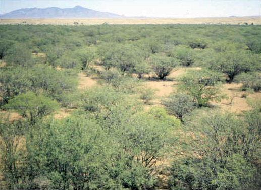 Fotografía de los chaparrales de Sonora, México. Tomada de la U.S. EPA (dominio público)